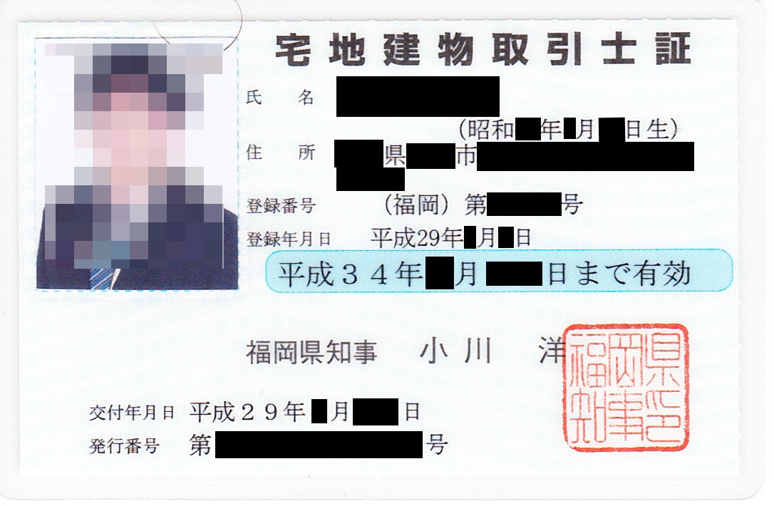 宅地建物取引士証（個人情報については伏せ字化）